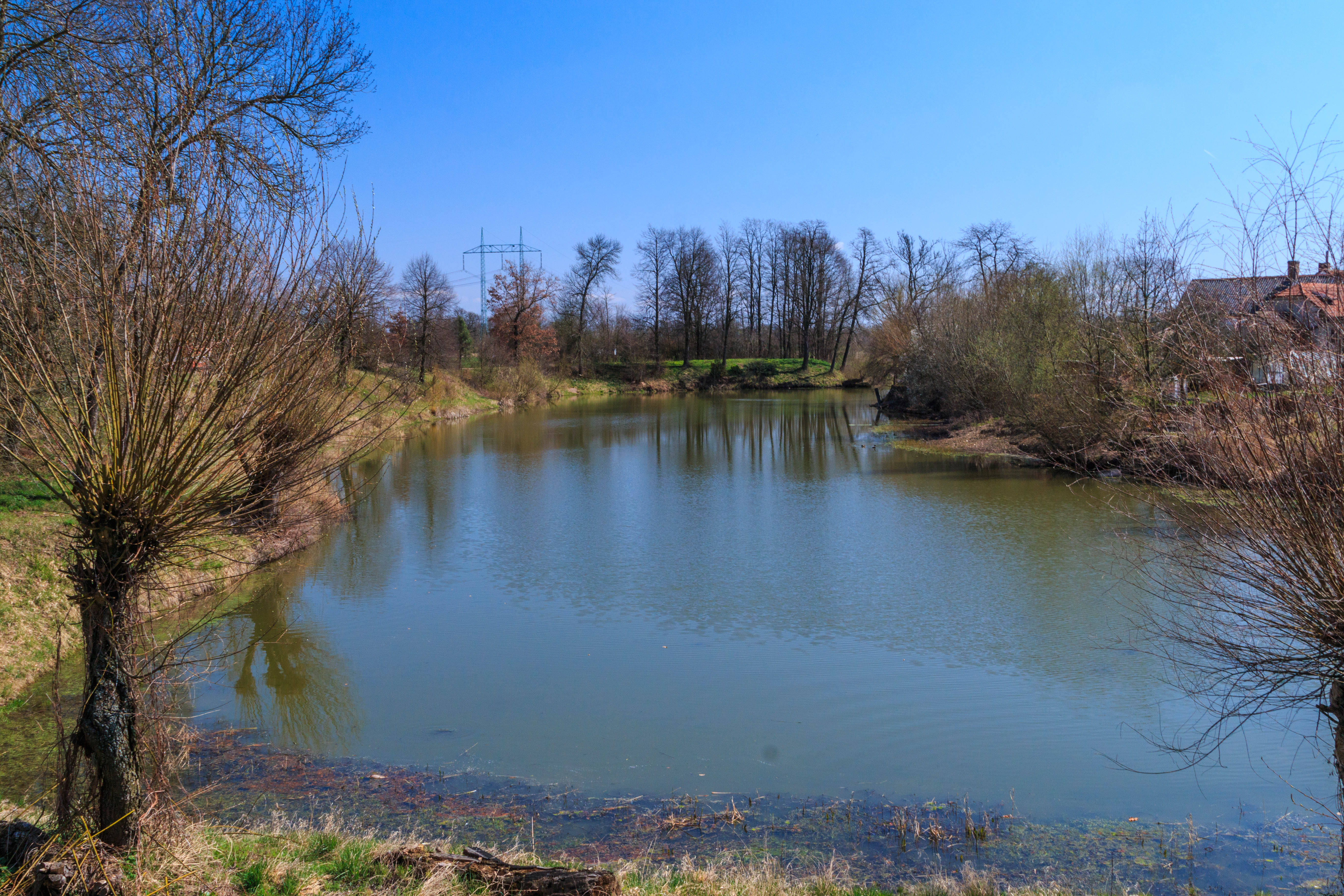 Rybník Houšovec u Řečan nad Labem Project: Vodstvo.